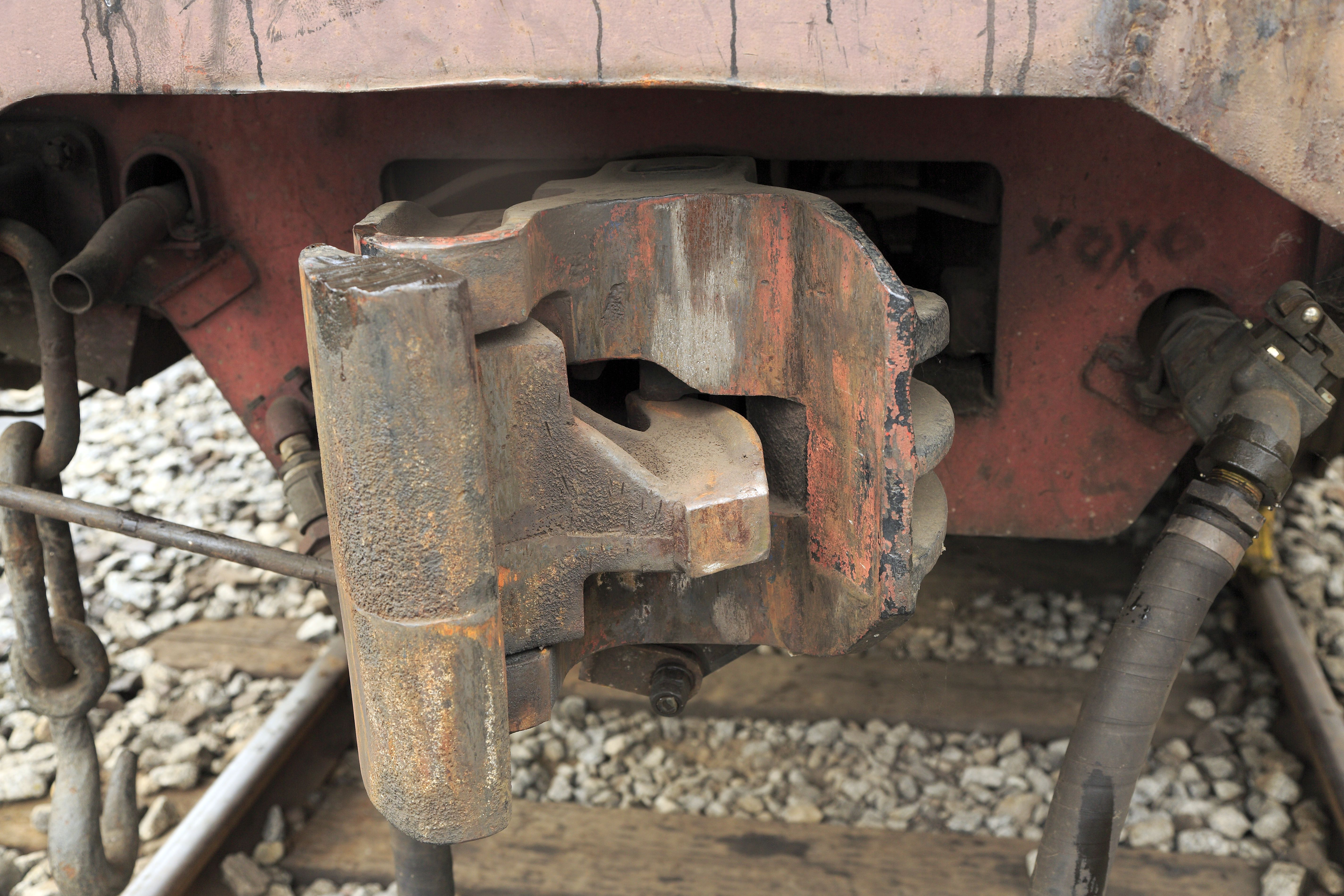 Janneykupplung in der ursprünglichen unstarren Ausführung. Der Nachteil im Vergleich mit den Kuplngen mit Willisojprofil ist, dass bei den Janneykupplungen mindestens einer der beiden zu verbindenden Kuppelköpfe entriegelt werden muss. Kupplungen mit Willisonprofil sind immer kuppelbereit, mit Ausnahme der absichtlichen Pufferstellung. Der Kuppelkopf ist entriegelt und kuppelreif.